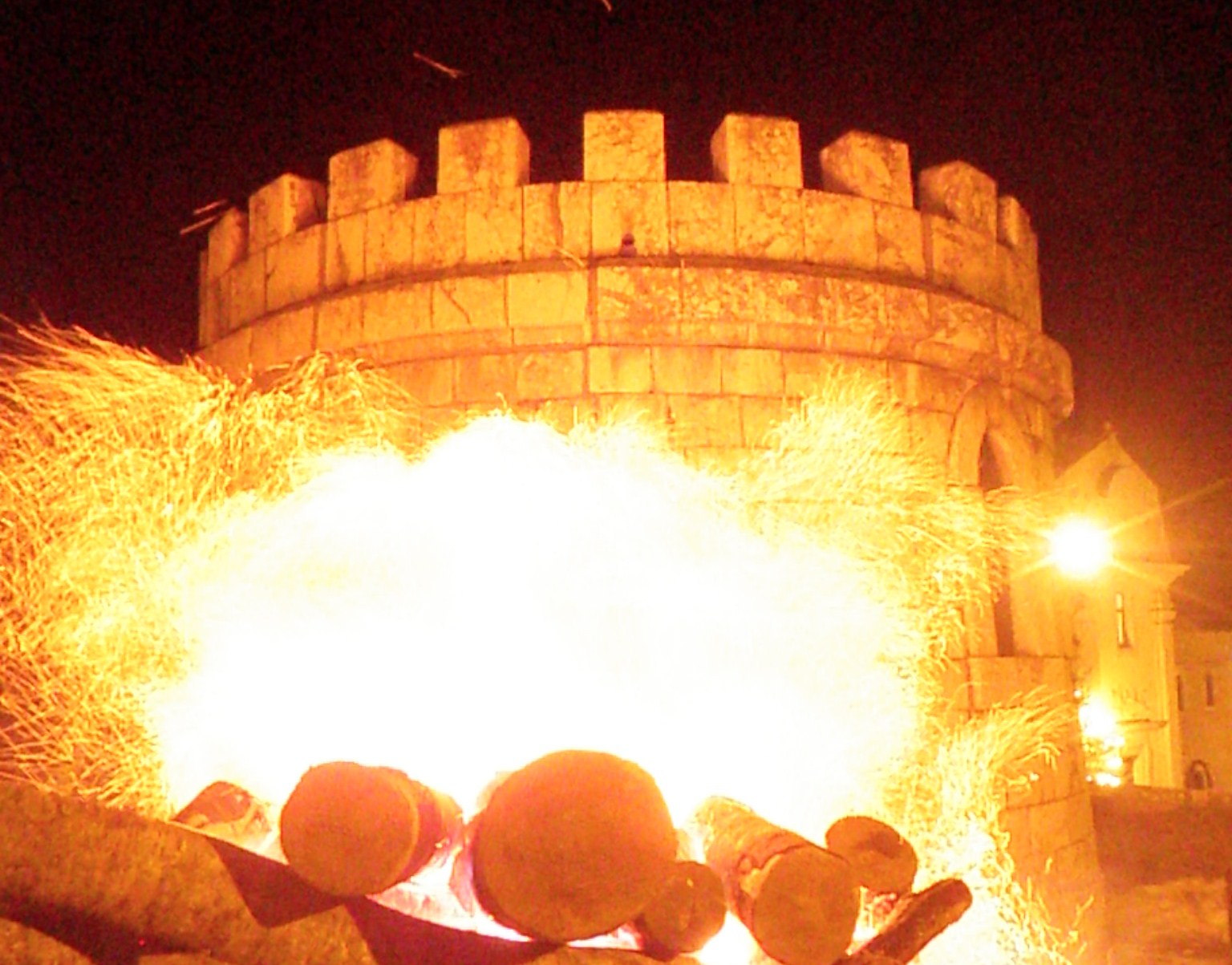 Fontane e monumenti This is a photo of a monument which is part of cultural heritage of Italy.